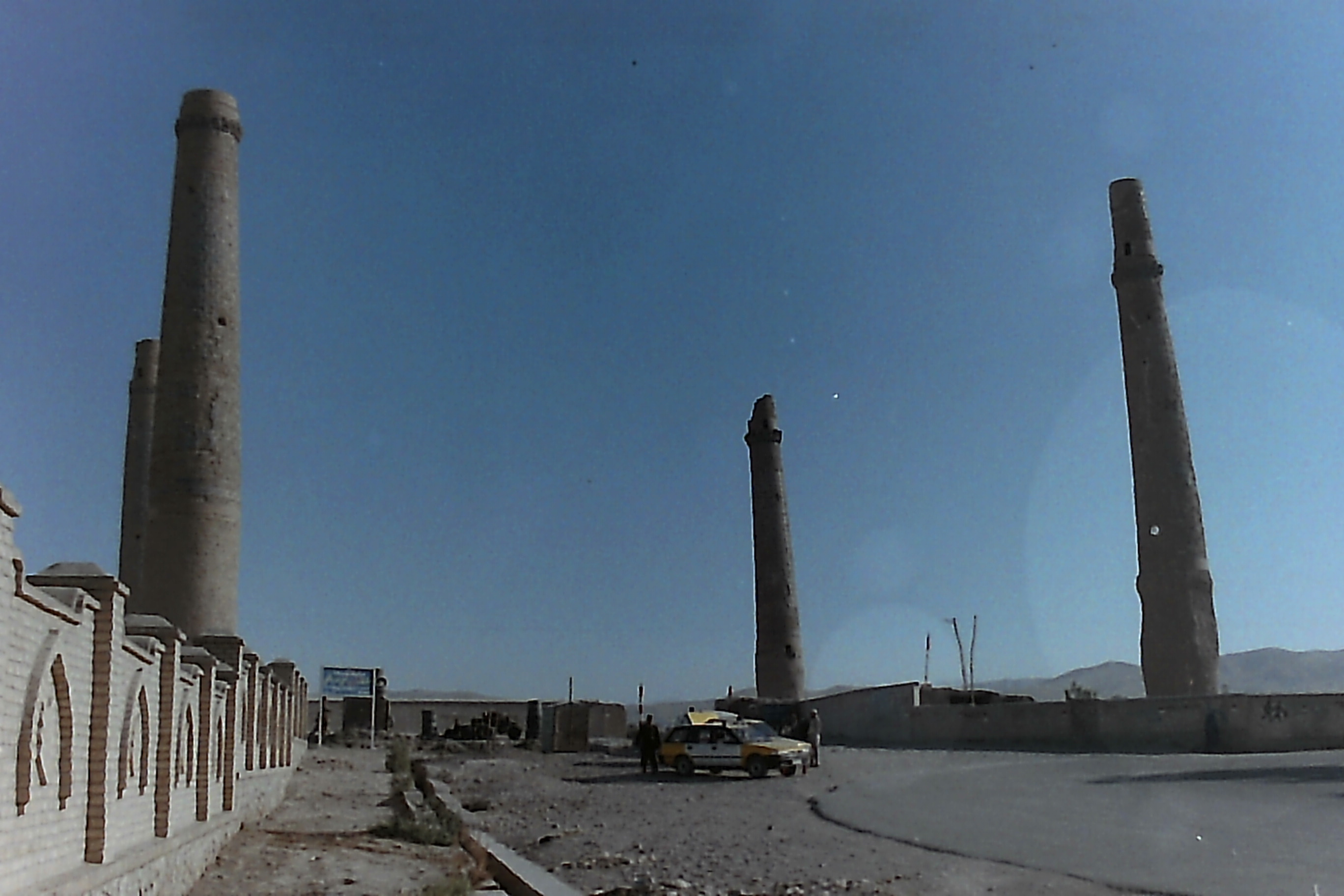 アフガニスタン・ヘラートにあるゴハール・ジャッドのモスク跡に残るミナレット 2003年8月に訪問した際に撮影（フィルムスキャナーでネガをデジタル画像化）